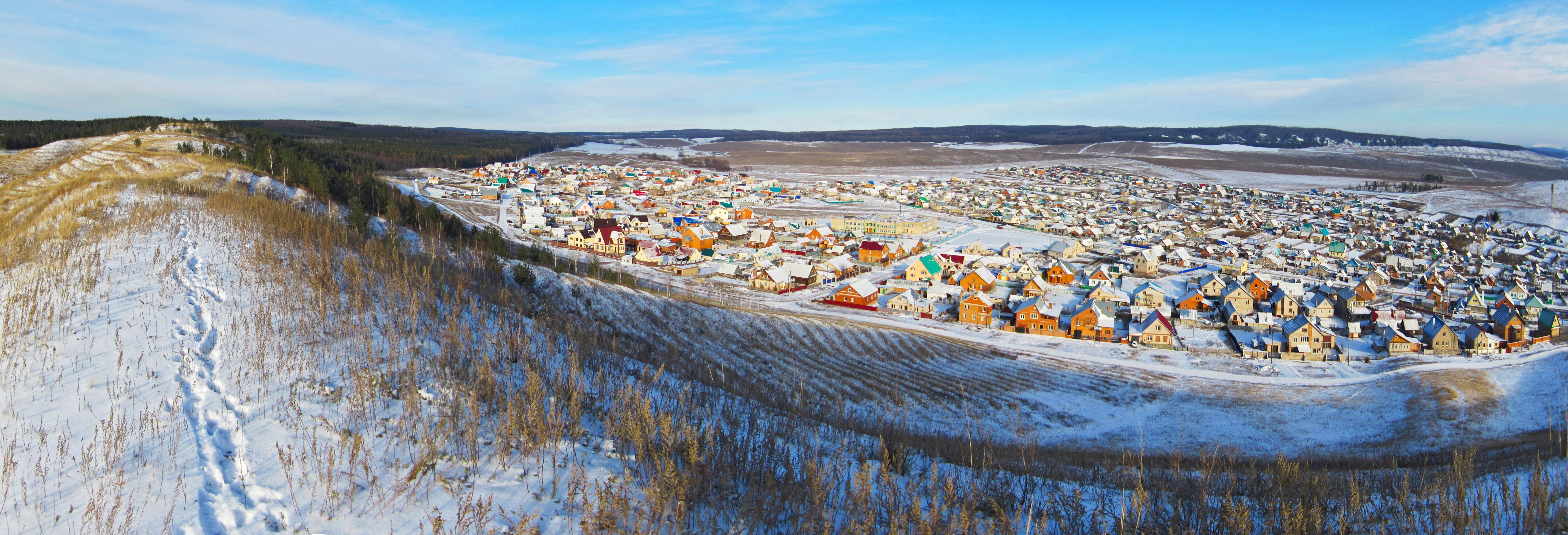 Panorama microdistrict Smakaevo, Ishimbay, Bashkortostan